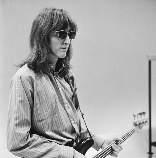 Q65 in het televisieprogramma Fanclub